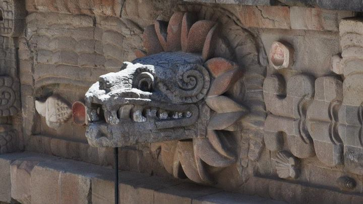 cabeza de quetzalcoatl (piramide a quetzalcoatl tehotihuacan mex.)